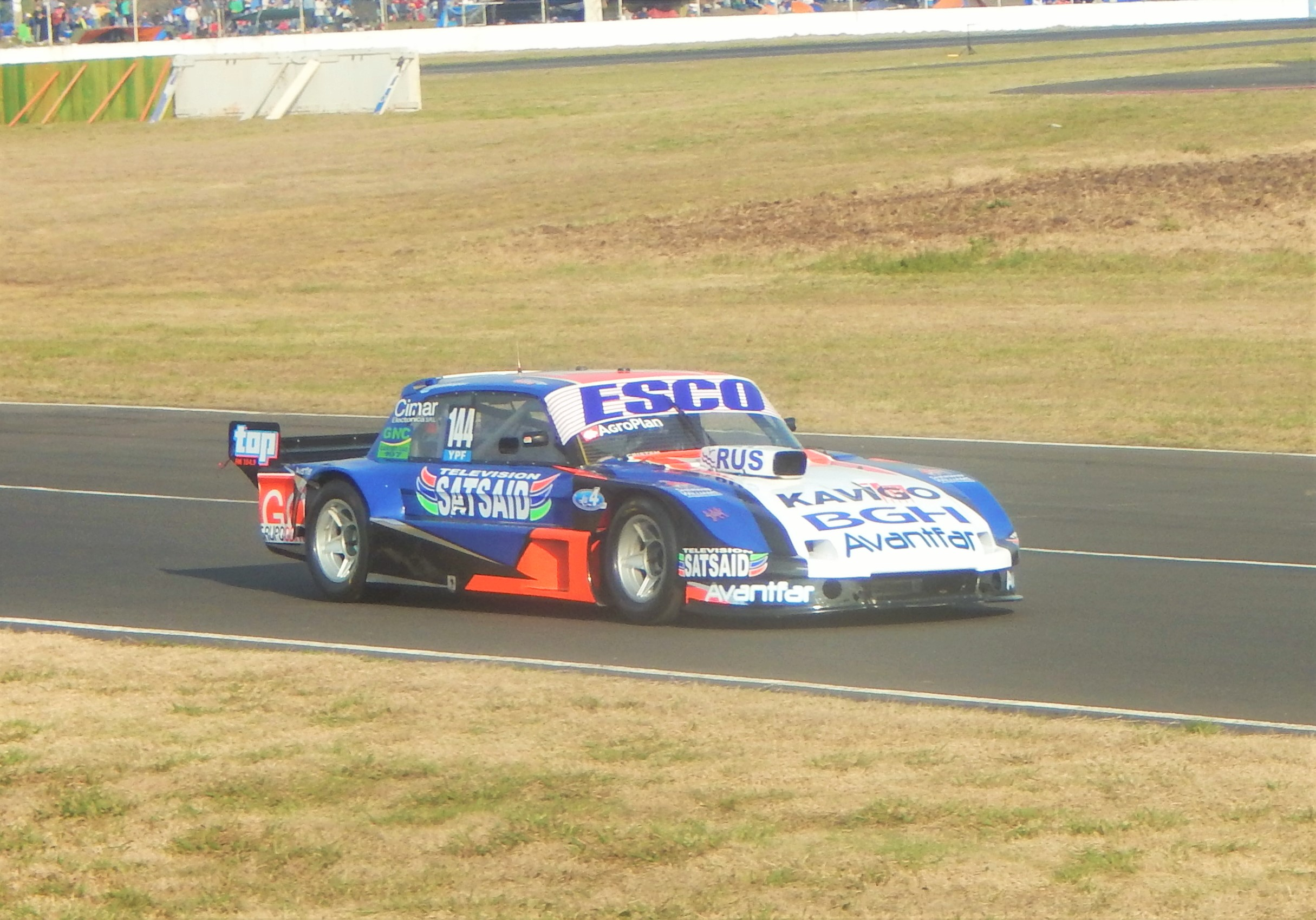 José Savino Paraná 2015